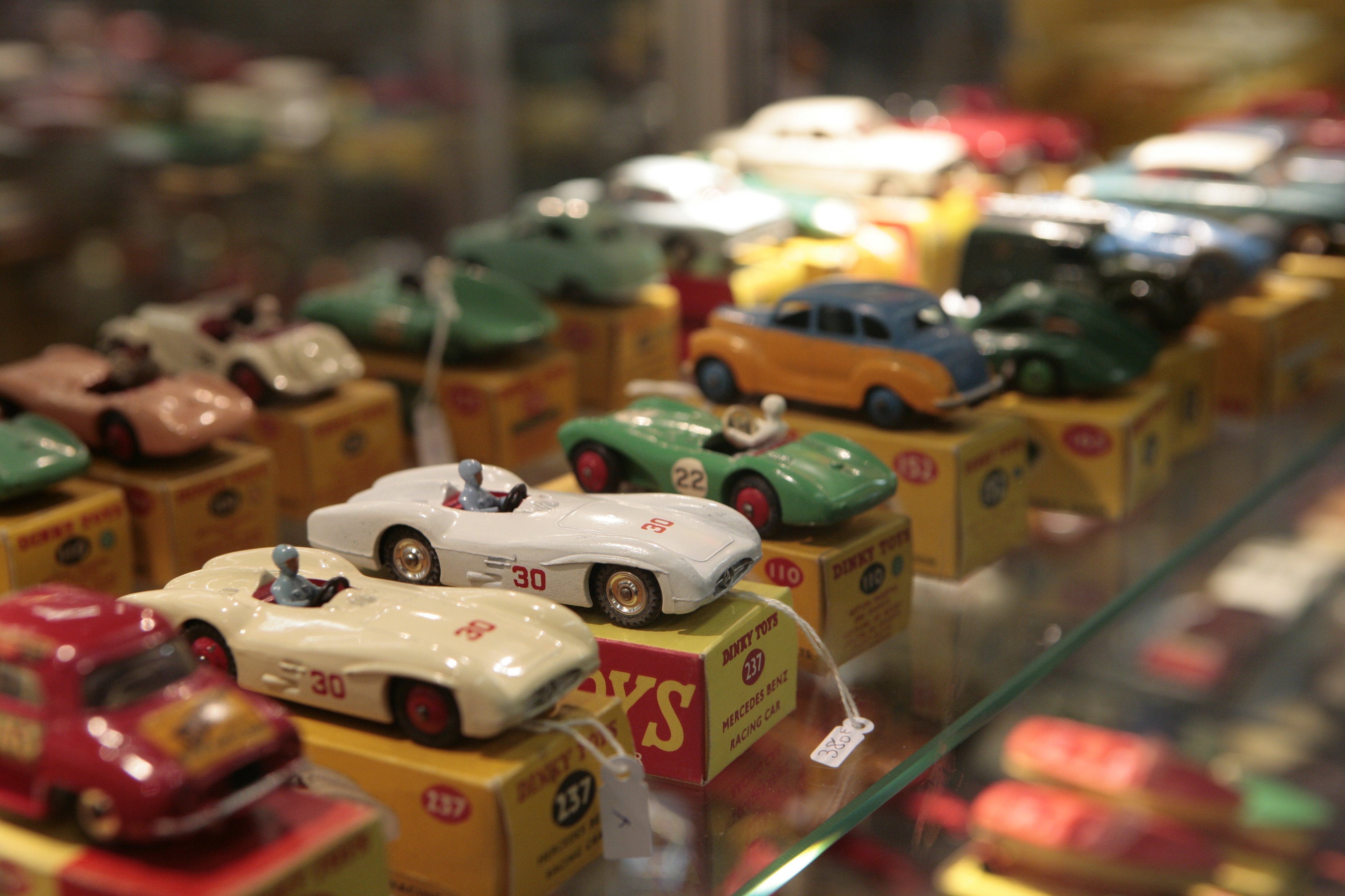 miniatures